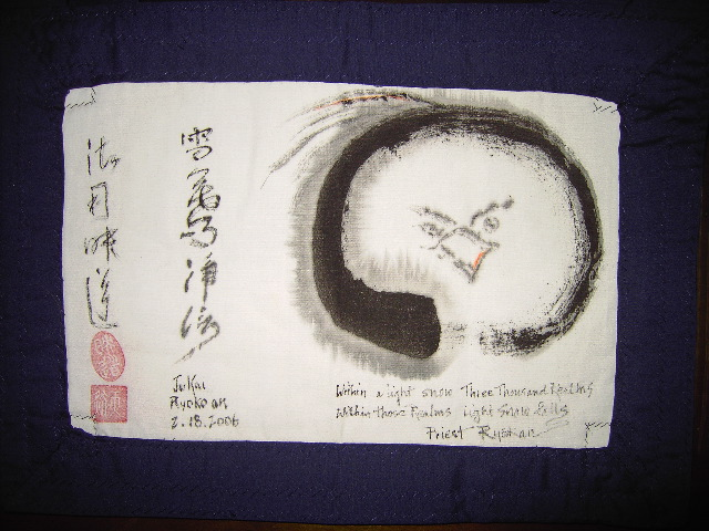 Das "weisse Fenster" auf der Rückseite eines Rakusu, das im Rahmen der Ordination (Jukai-Zeremonie) vom Zen-Lehrer beschriftet wurde.